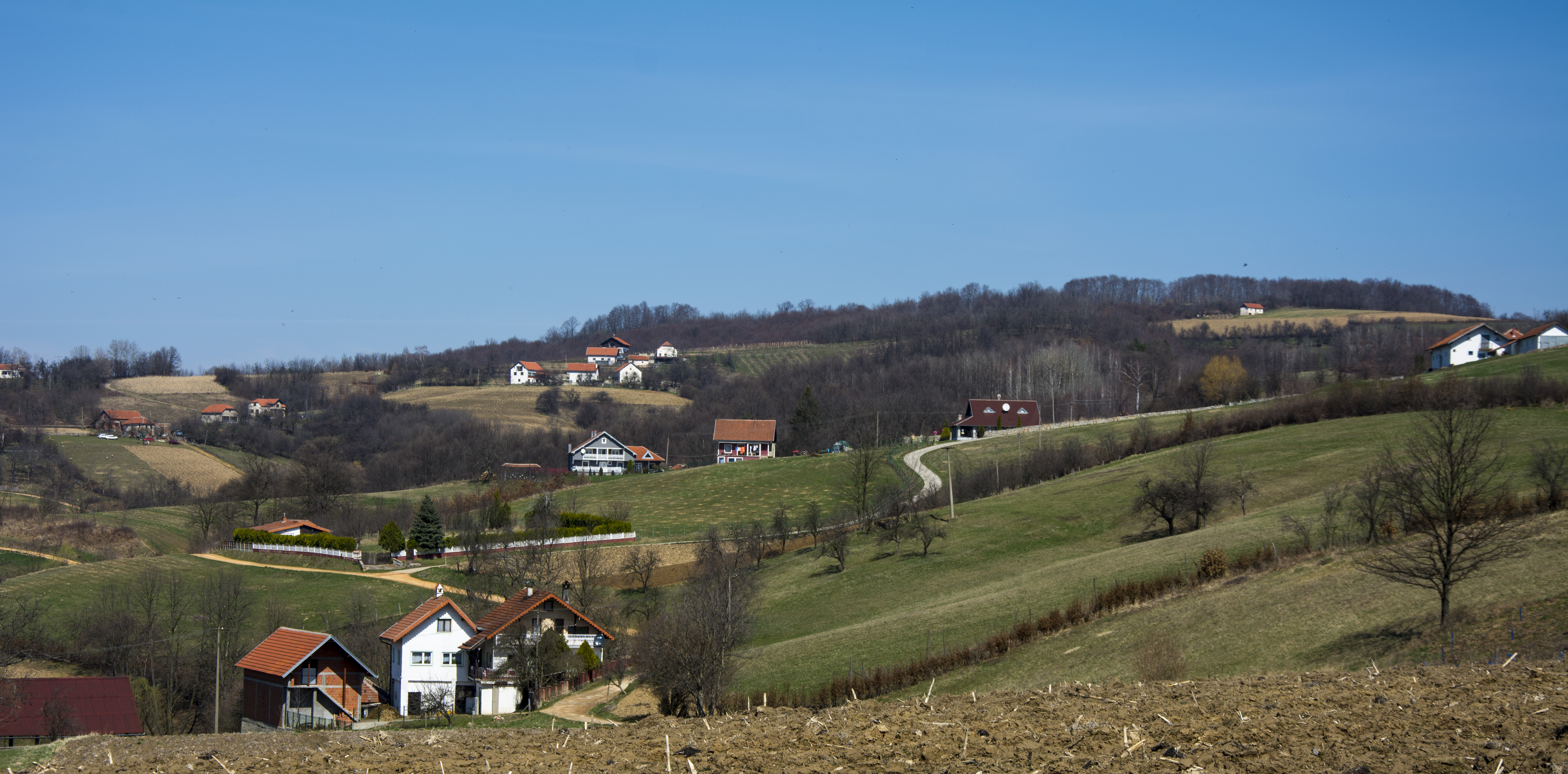 Село Липовица, општина Деспотовац